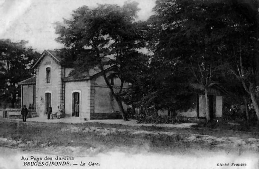 Ancien bâtiment voyageur de la gare de Bruges (Gironde), maintenant disparu. La carte postale porte comme indication "Au Pays des Jardins, Bruges Gironde, la Gare, Cliché Francès"